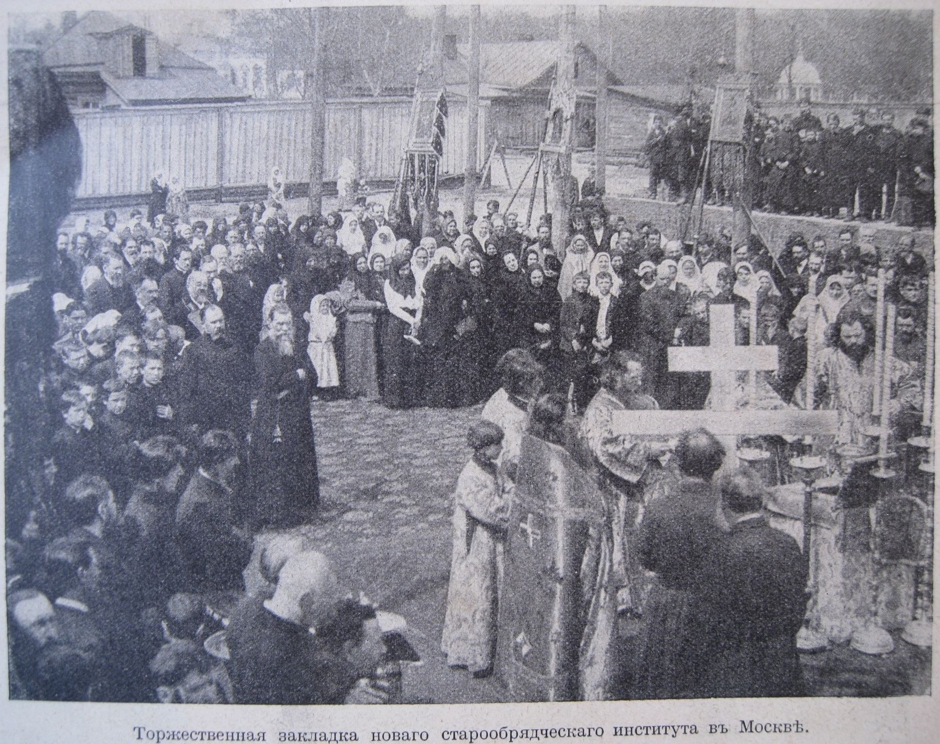 Закладка здания старообрядческого богословского института в Москве 27 апреля 1914 года